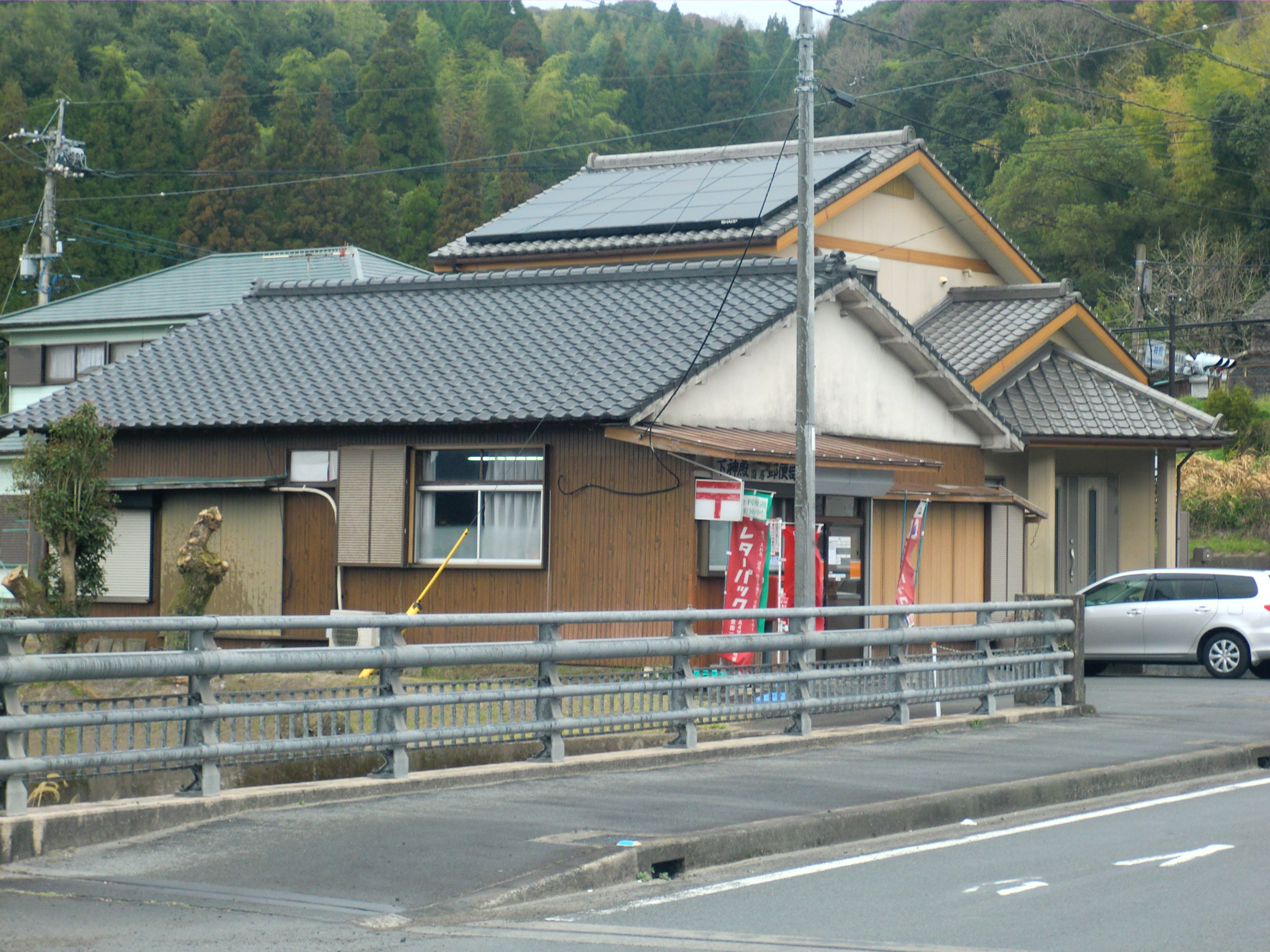 日置市にある下神殿（しもこどん）簡易郵便局